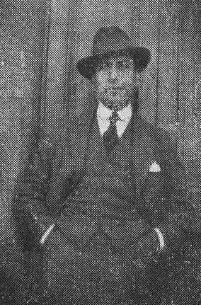 Juan Martínez Buján, fotografía en Vida Gallega 1920